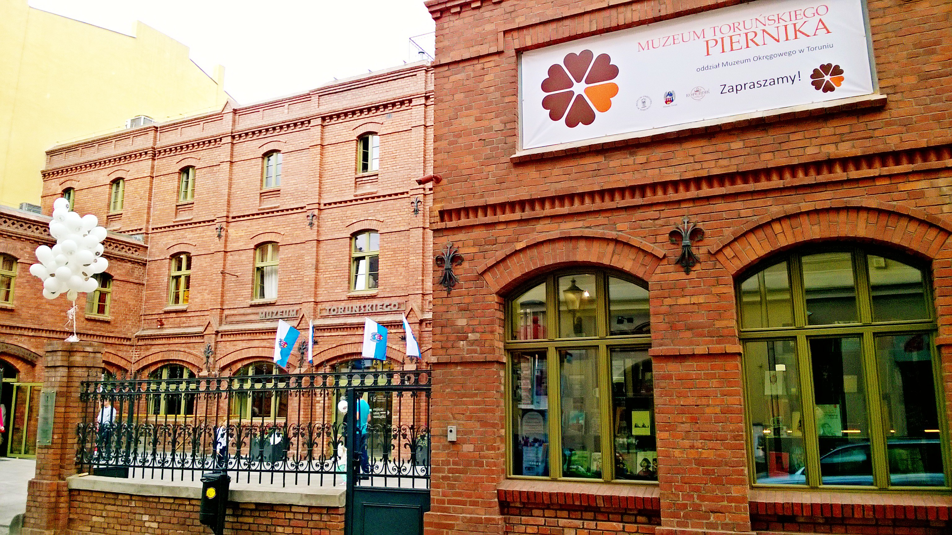 Muzeum Toruńskiego Piernika1